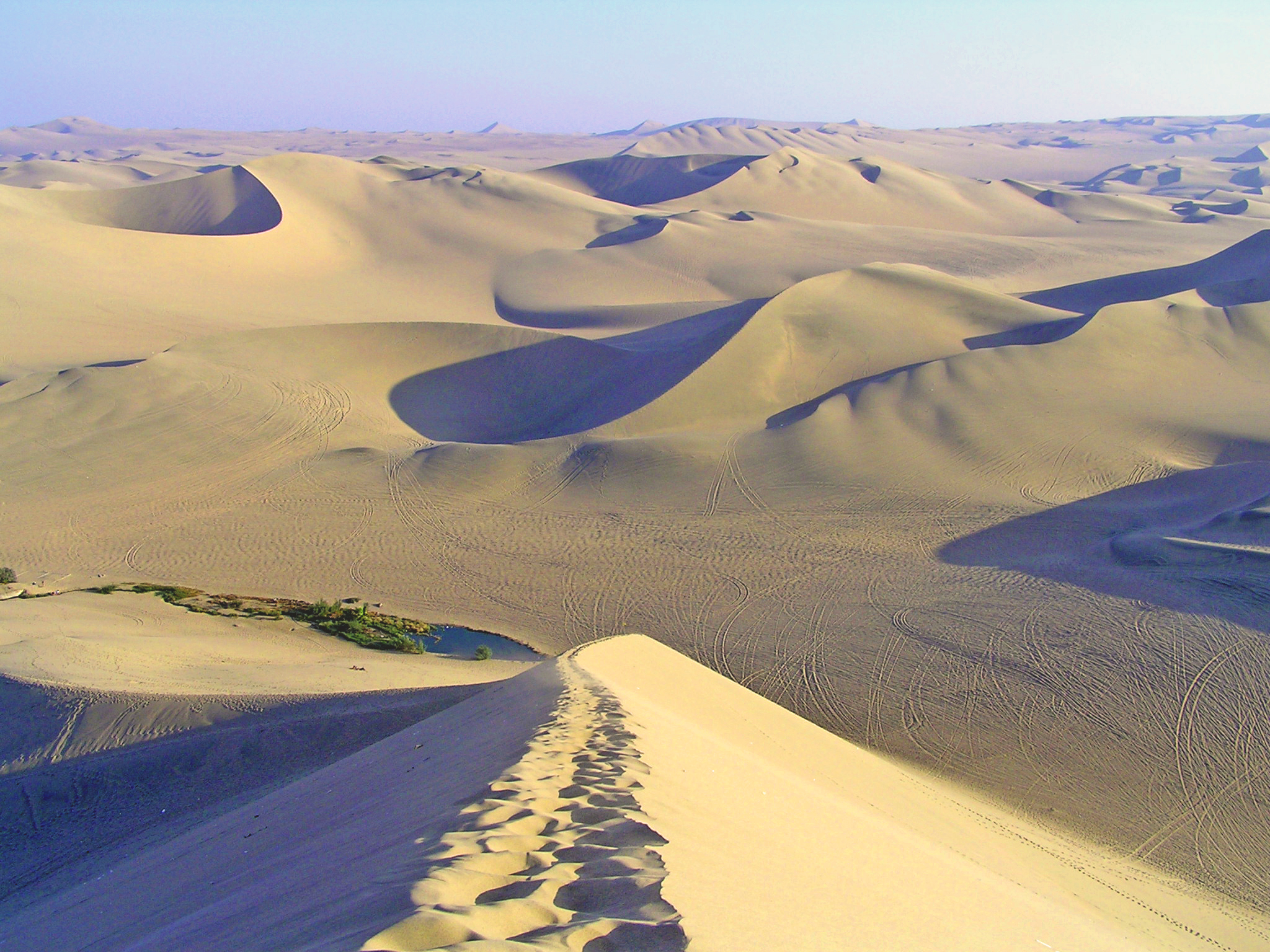 Huacachina, Peru, 2005